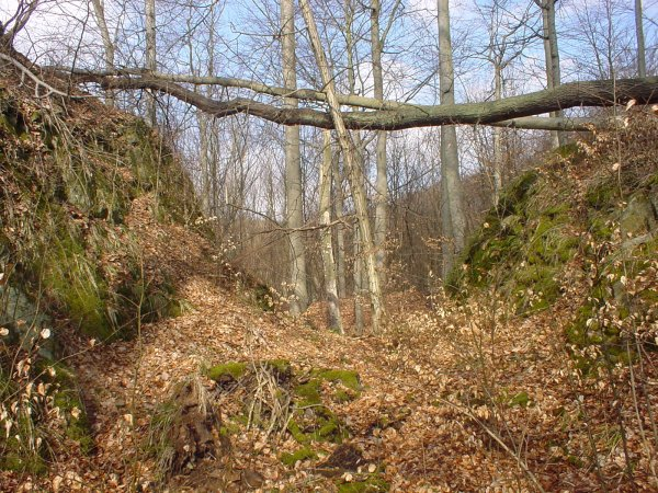 Alt-Morungen public domain „eigenes Foto von 2004“ (Aus Diskussion übertragen von Leipnizkeks)